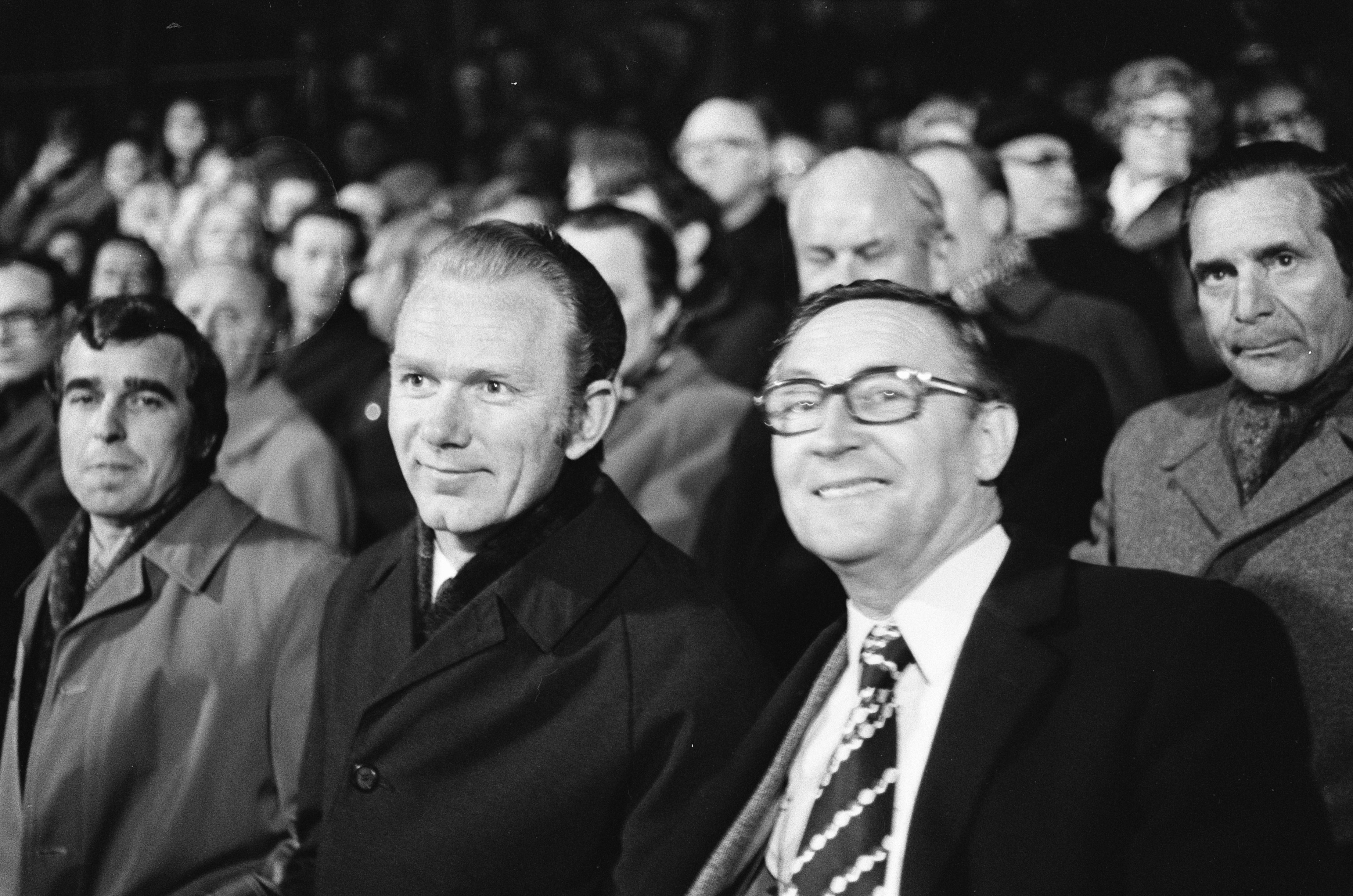 Collectie / Archief : Fotocollectie Anefo Reportage / Serie : [ onbekend ] Beschrijving : PSV tegen Telstar 1-0, op tribune trainer Lobanovic ( Dynamo Kiev ) en manager Van Gelder (rechts) Datum : 5 april 1975 Trefwoorden : managers, sport, trainers, tribunes, voetbal Persoonsnaam : Dynamo Kiev Fotograaf : Mieremet, Rob / Anefo Auteursrechthebbende : Nationaal Archief Materiaalsoort : Negatief (zwart/wit) Nummer archiefinventaris : bekijk toegang 2.24.01.05 Bestanddeelnummer : 927-8552